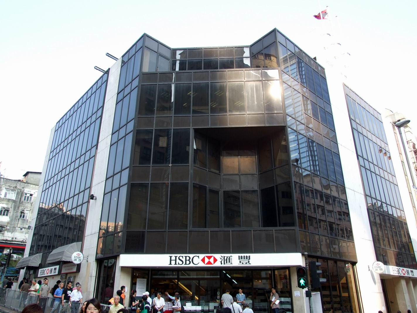 匯豐銀行觀塘分行